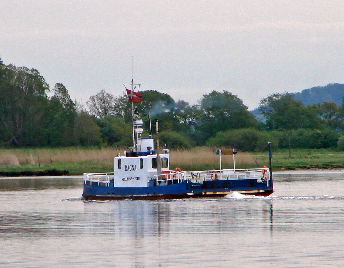 Mellerup-Voer færgen M/F Ragna over Randers Fjord